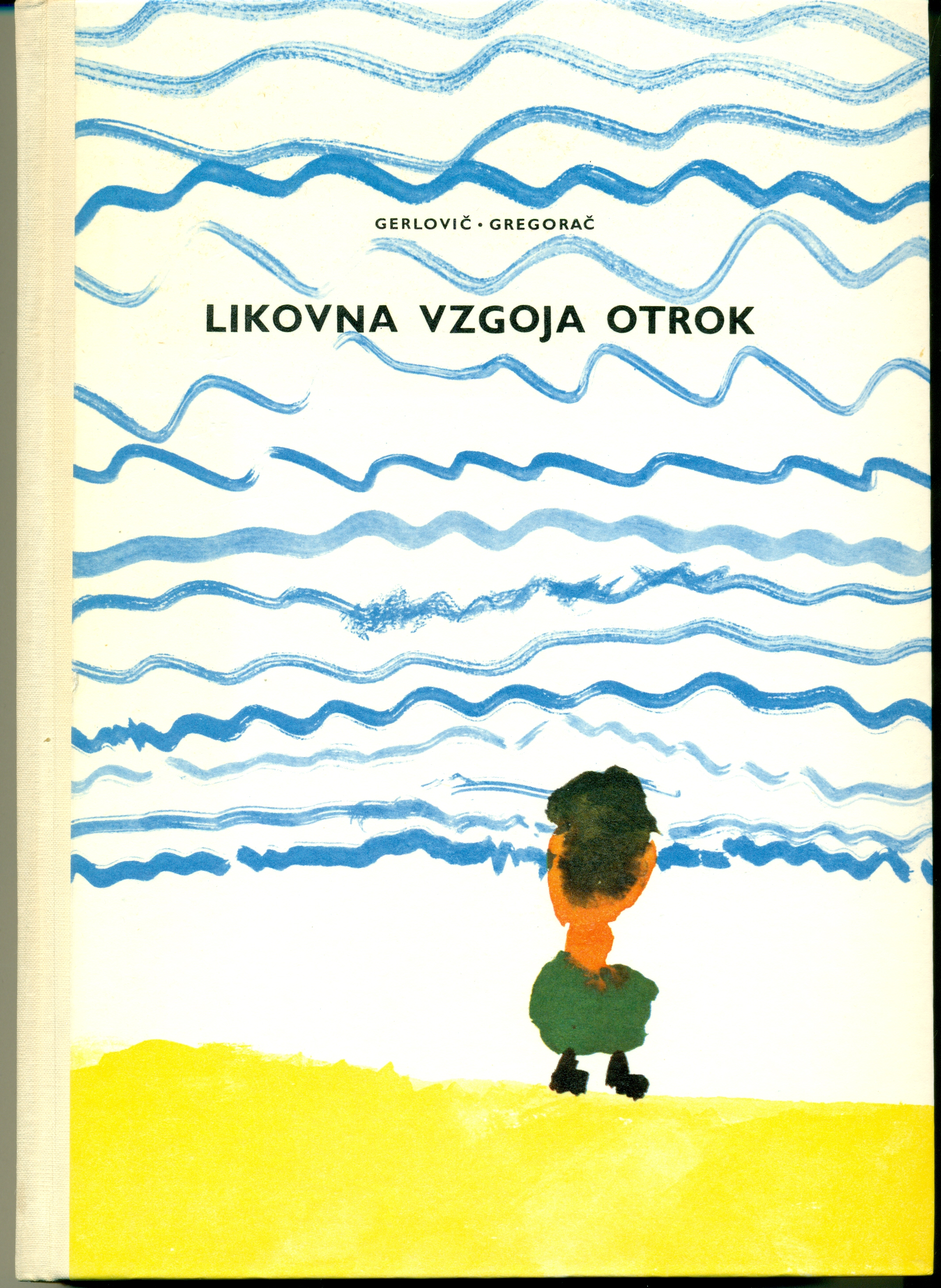 Likovna vzgoja otrok (1968)